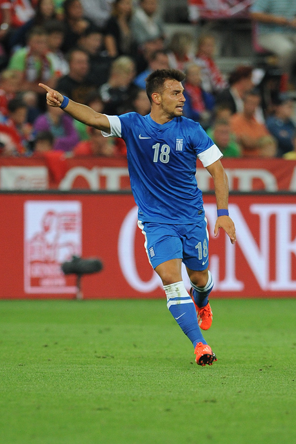 Freundschaftliches Länderspiel Österreich - Griechenland am 14. August 2013 in Salzburg: Sotiris Ninis